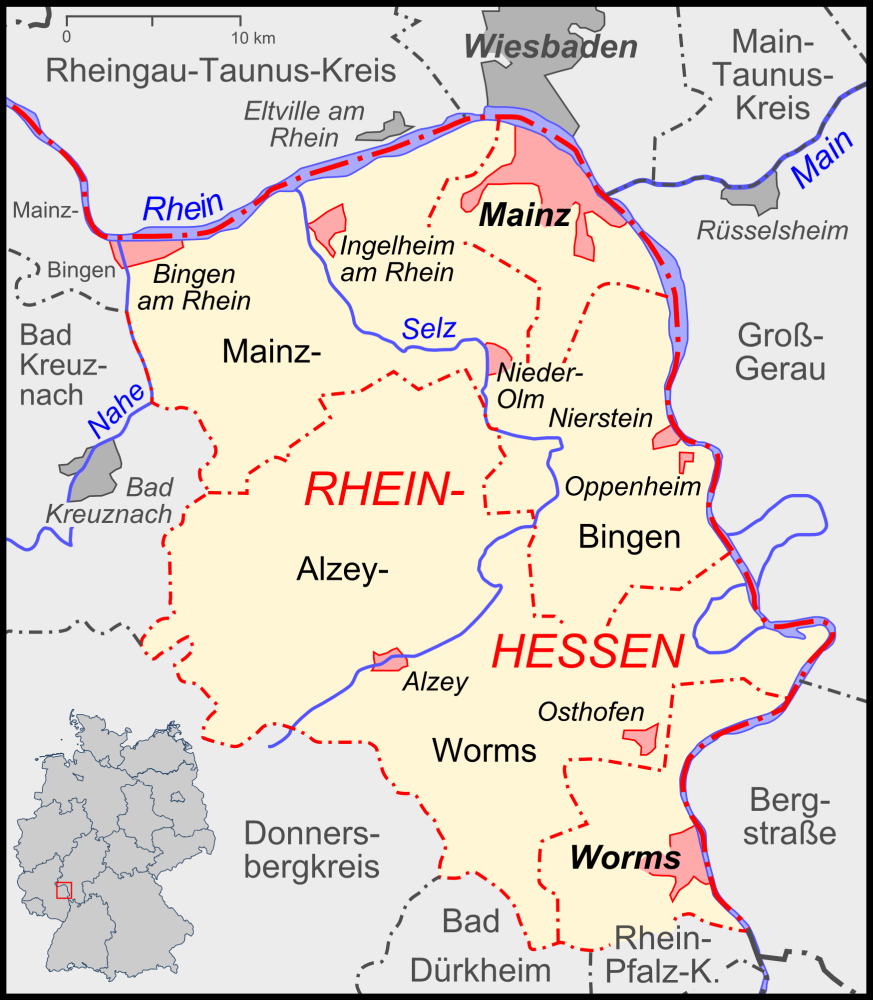 Topographische Karte von Rheinhessen